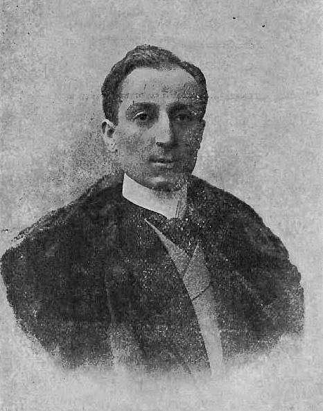 Stanisław Rittel (-1904)